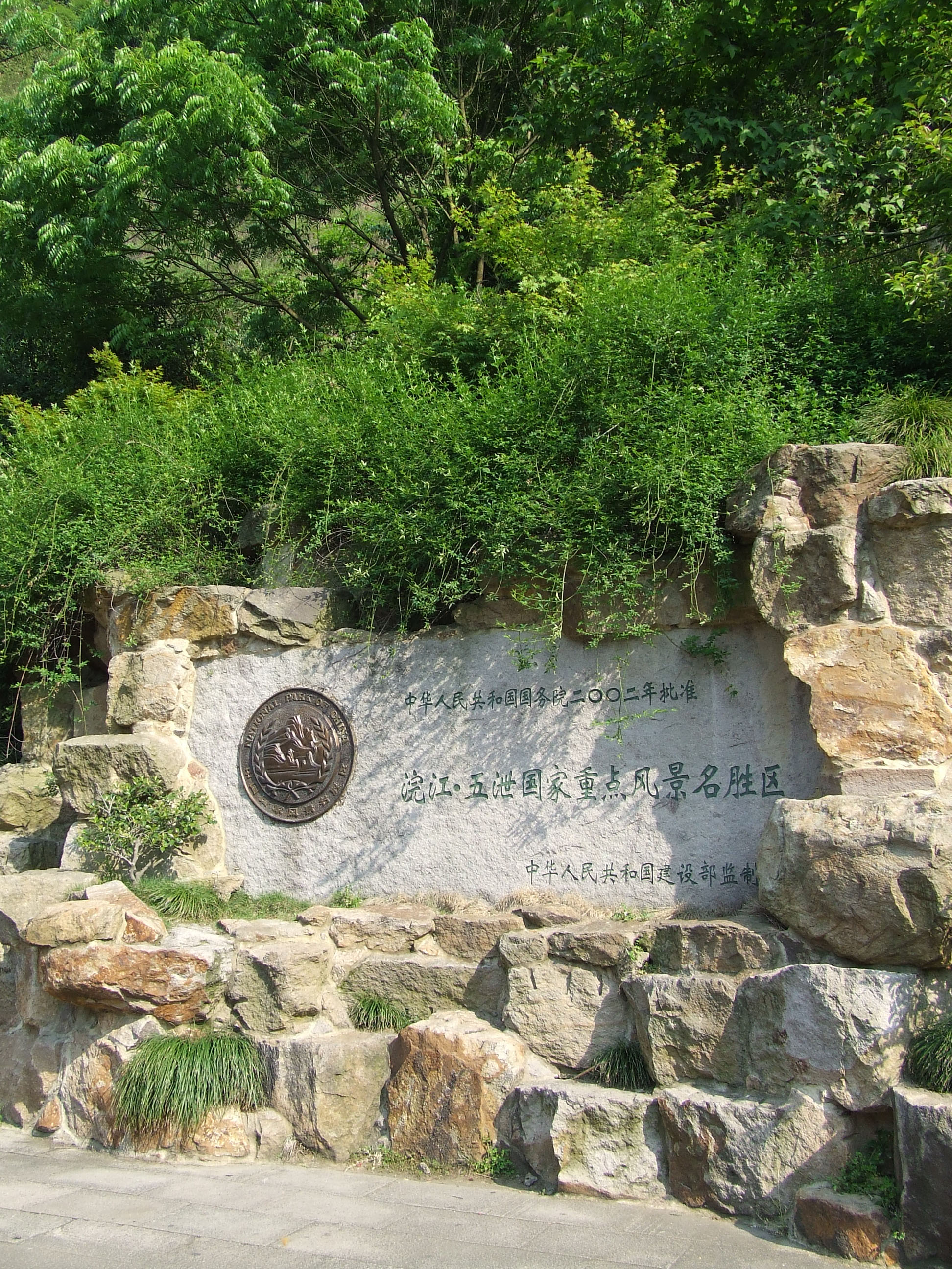 五泄风景区